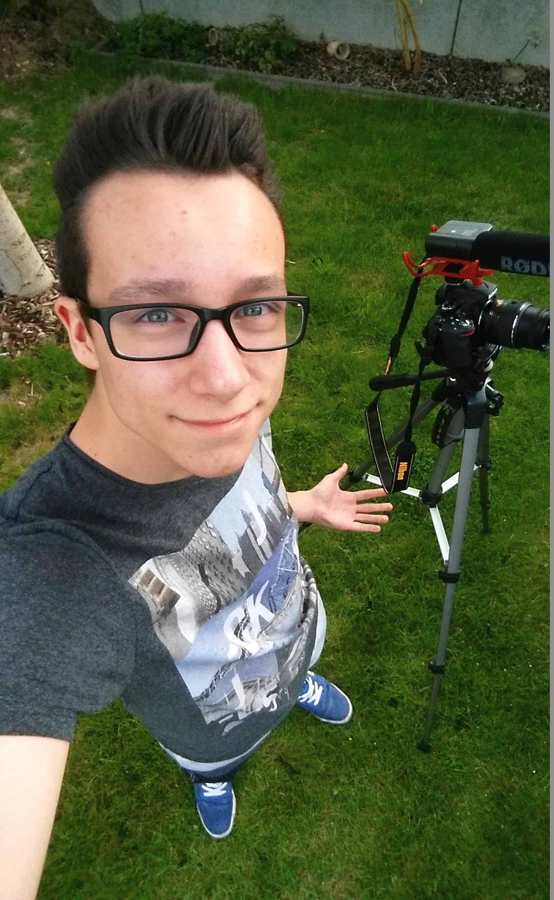 De Philippe am Juni 2015